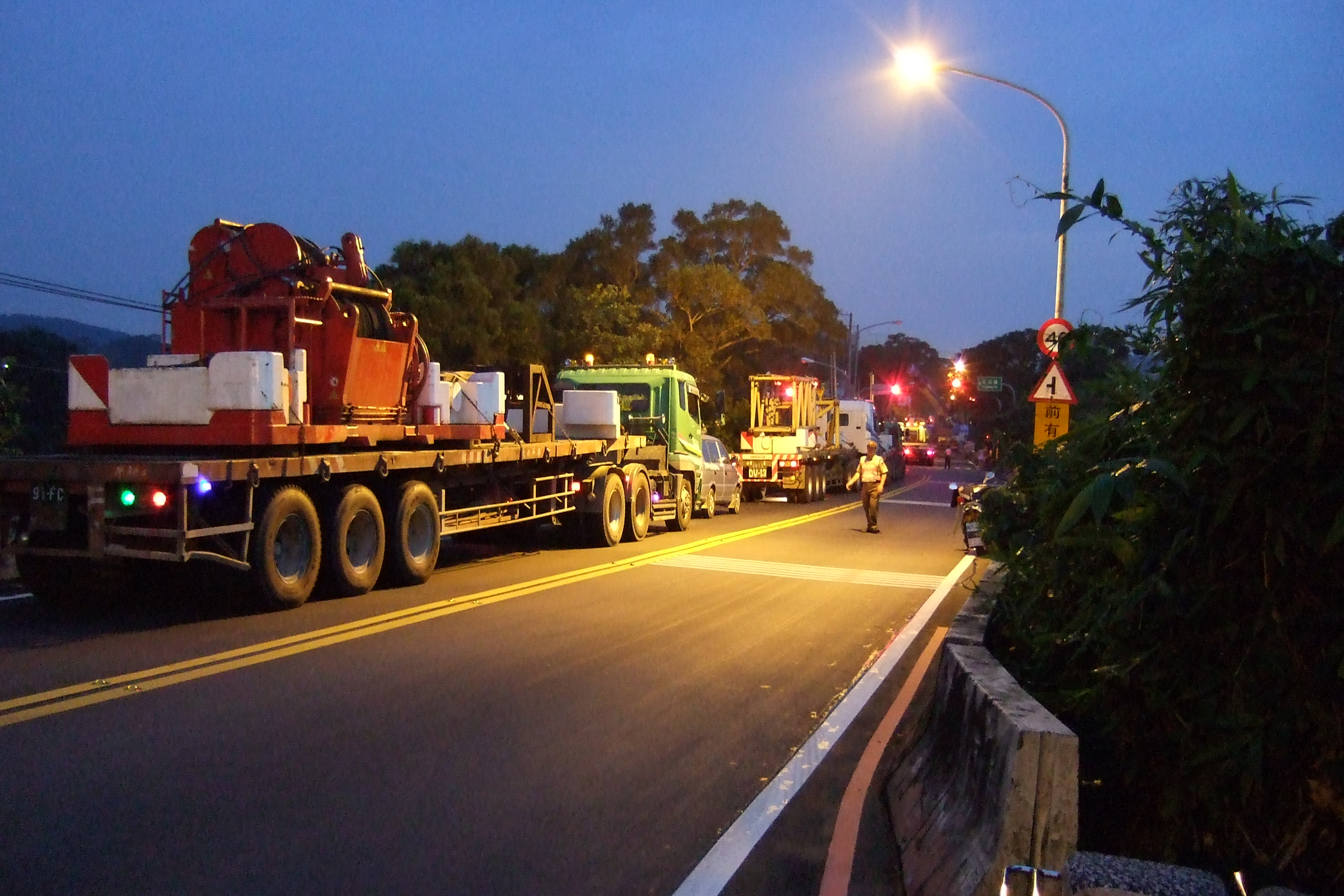 中文（台灣）: 2007年陽明山遊覽車事故隔天晚間的事故現場。